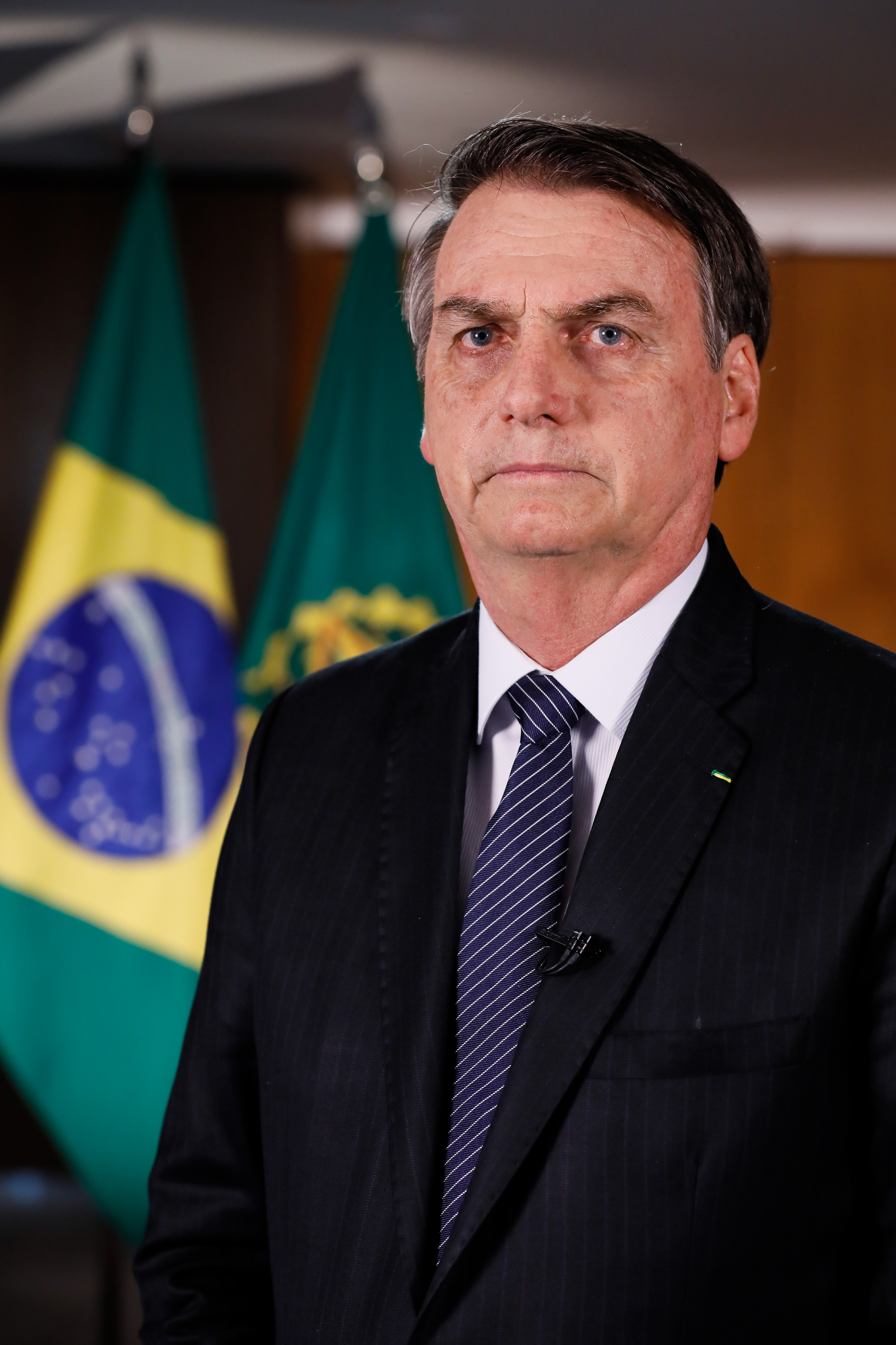 (Brasília - DF, 24/04/2019) Pronunciamento do Presidente da República, Jair Bolsonaro.